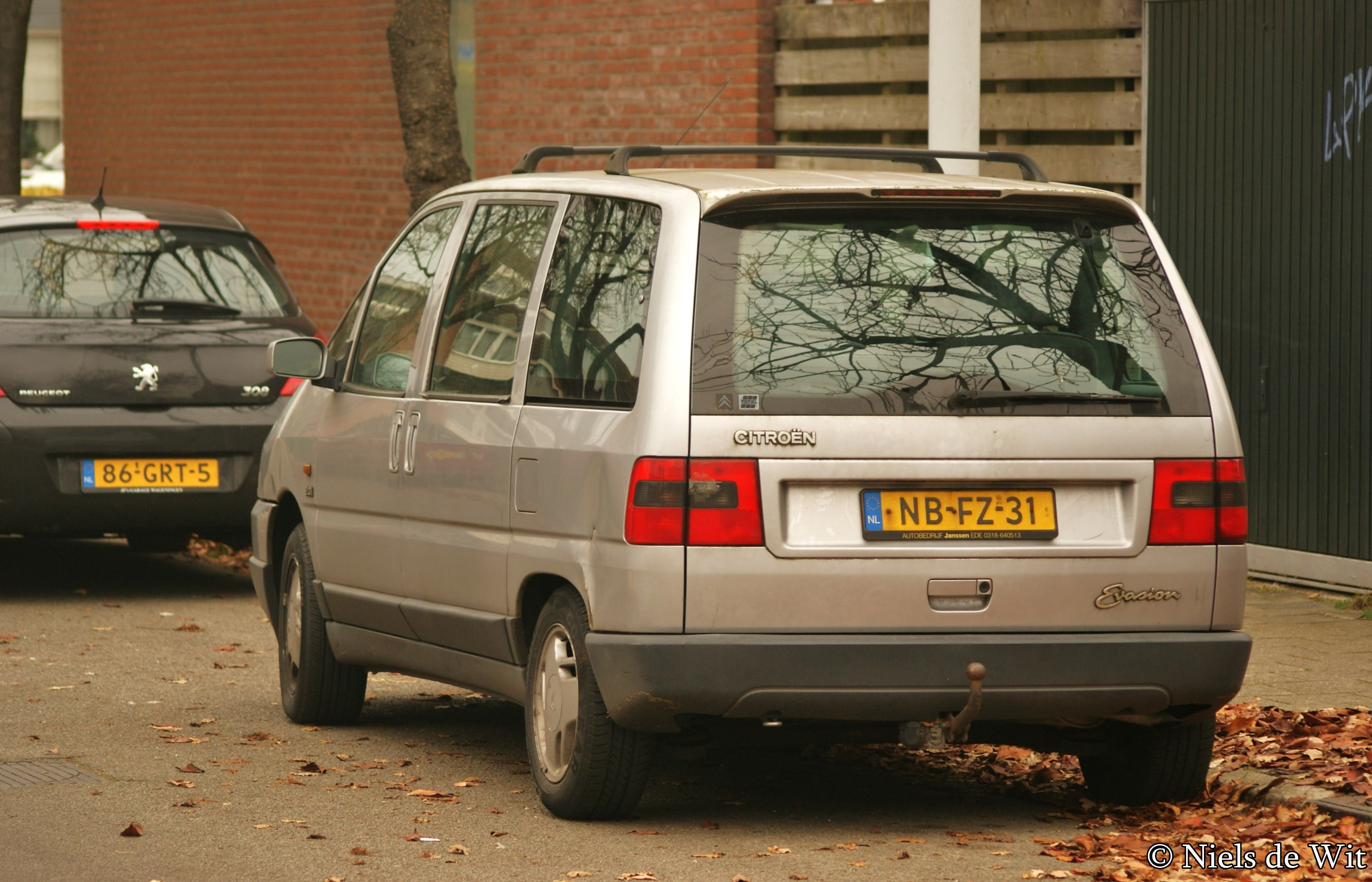 NB-FZ-31